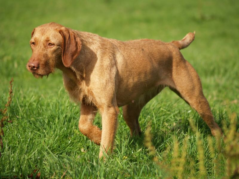 drótosvizsla vadat áll